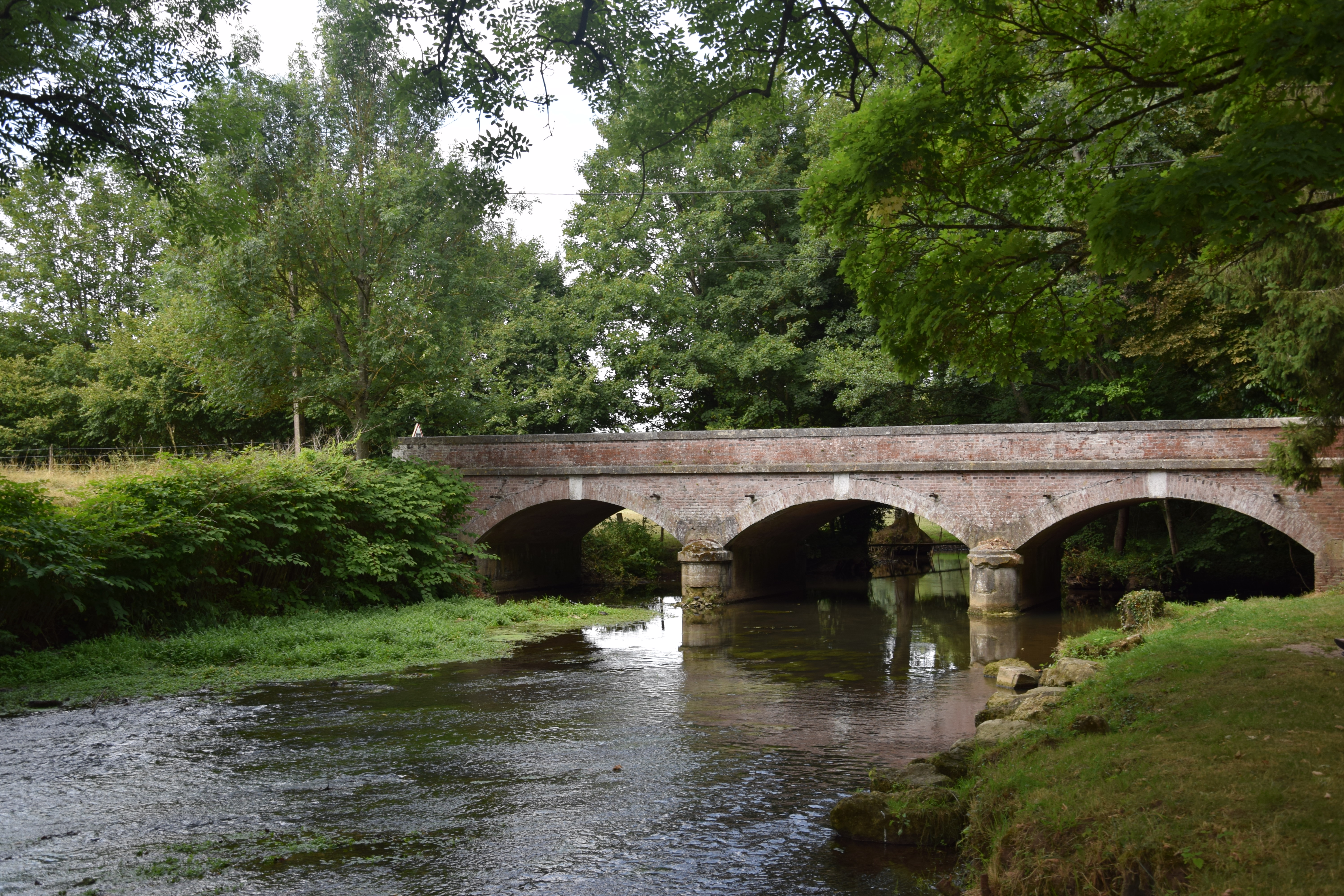 Talmontiers